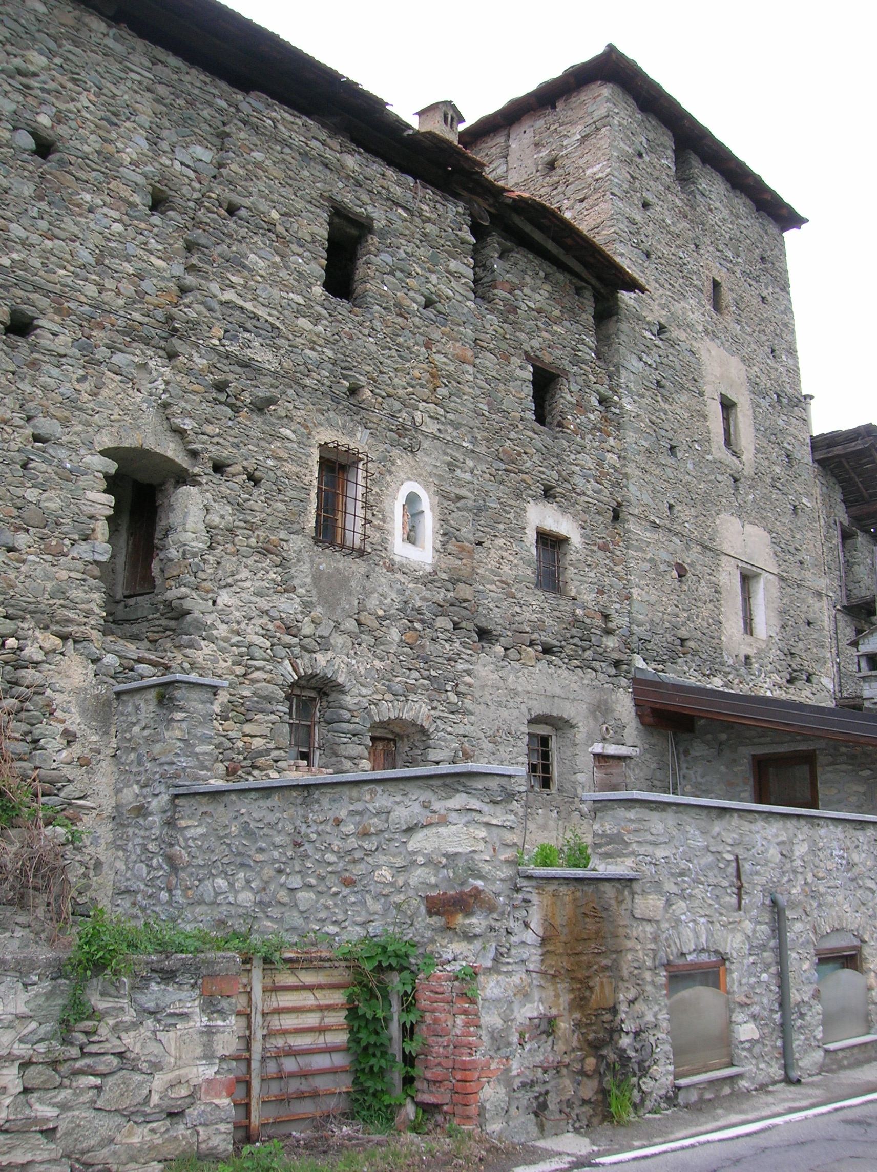 Facciata della Casaforte di Rhins, Roisan, Valle d'Aosta, Italia.